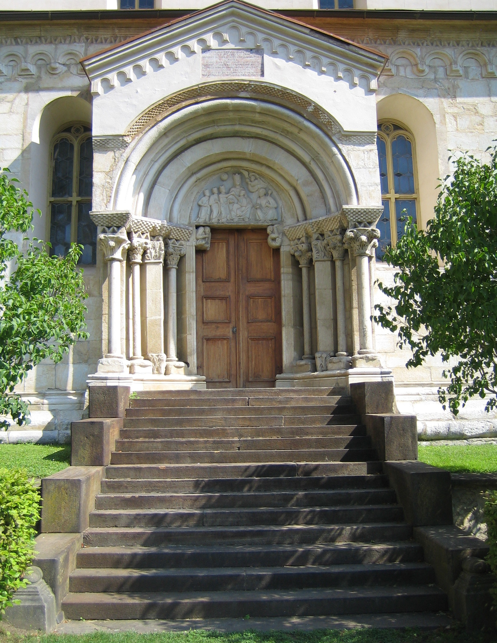 Südportal der Stiftskirche St. Paul im Lavanttal